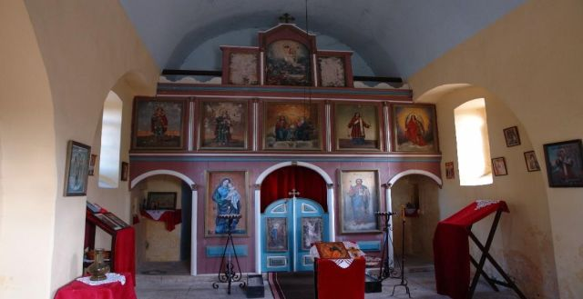 Crkva Svetog proroka Ilije Trebijovi